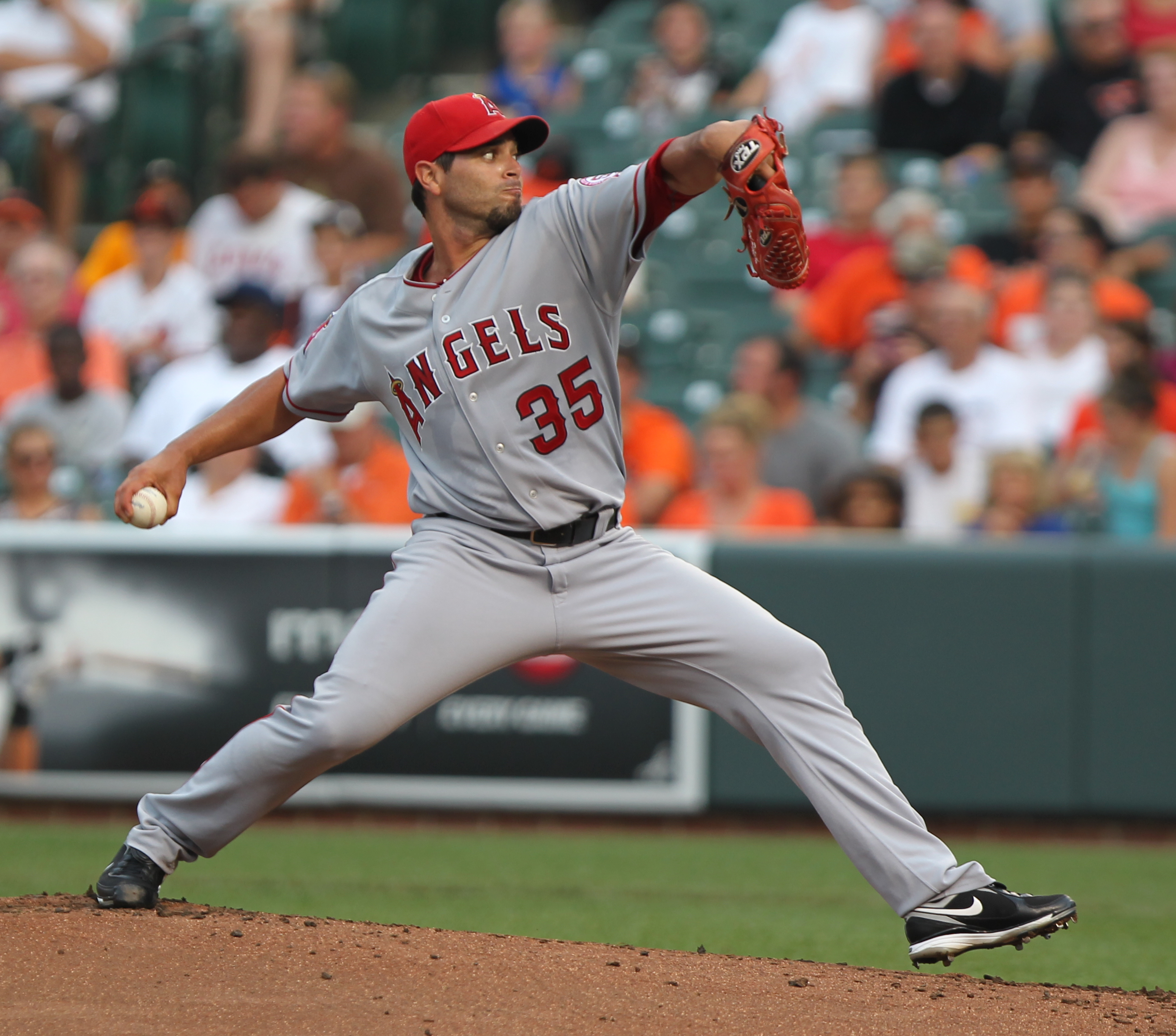 Joel Piñeiro